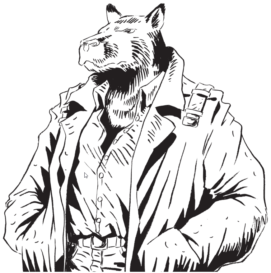 Illustration issue de la page 289 du PDF de la version 3 du jeu Tigres Volants (rowaan)